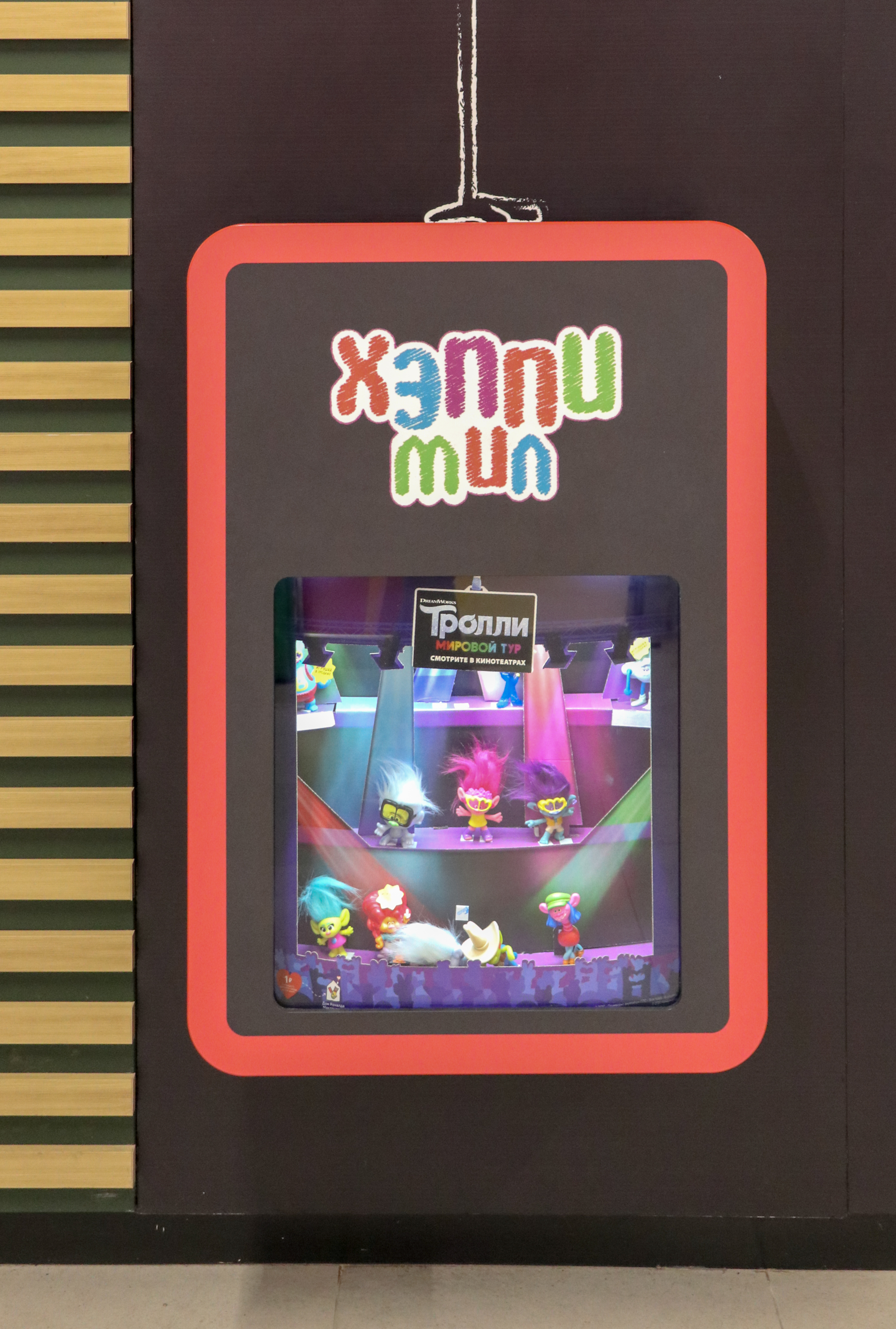 Образцы игрушек по мотивам мультфильма Тролли в Хэппи Мил в МакДоналдс в Москве